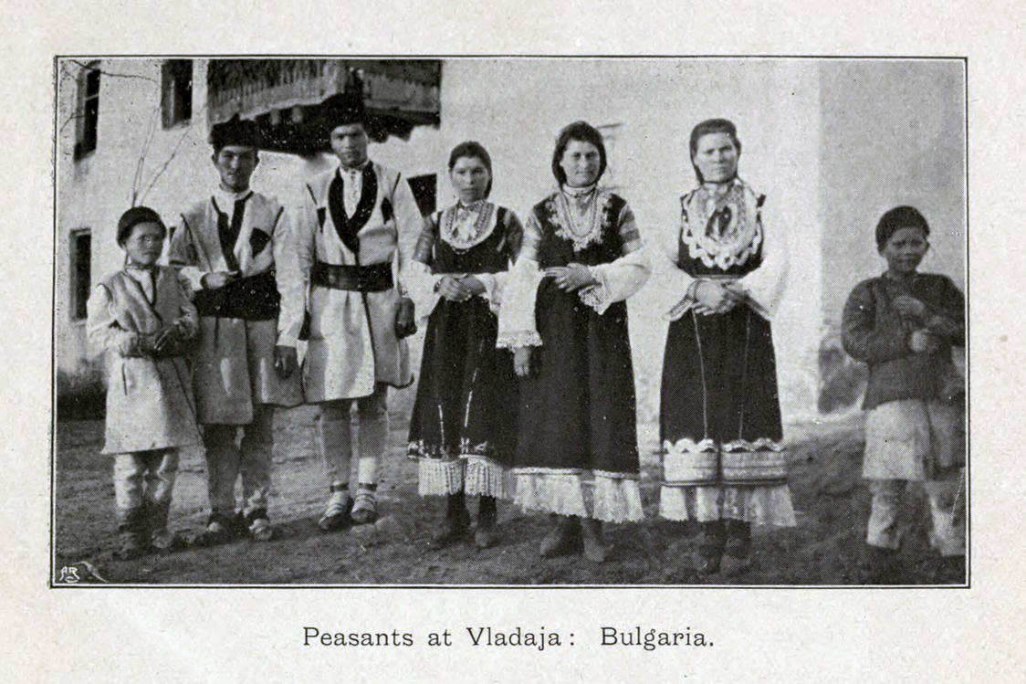 Original description: "Peasants at Vladaja: Bulgaria"